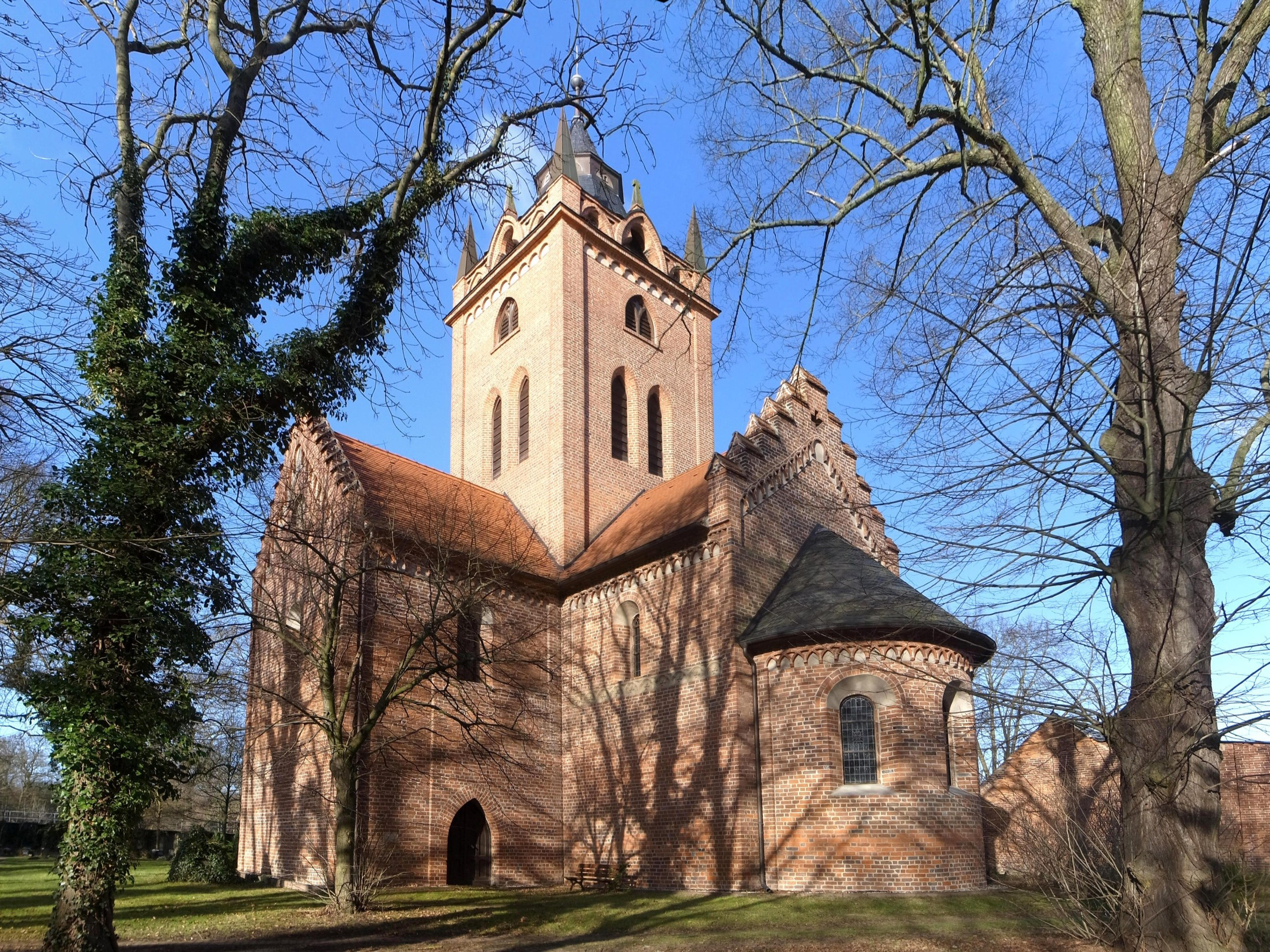 Dessau Ortsteil Mildensee, Pötnitzer Kirche